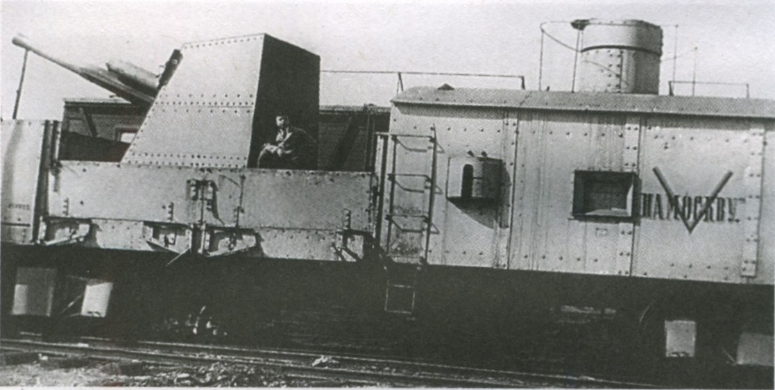 Бронепоезд «На Москву». Захвачен РККА в Новороссийске. Апрель 1920 года